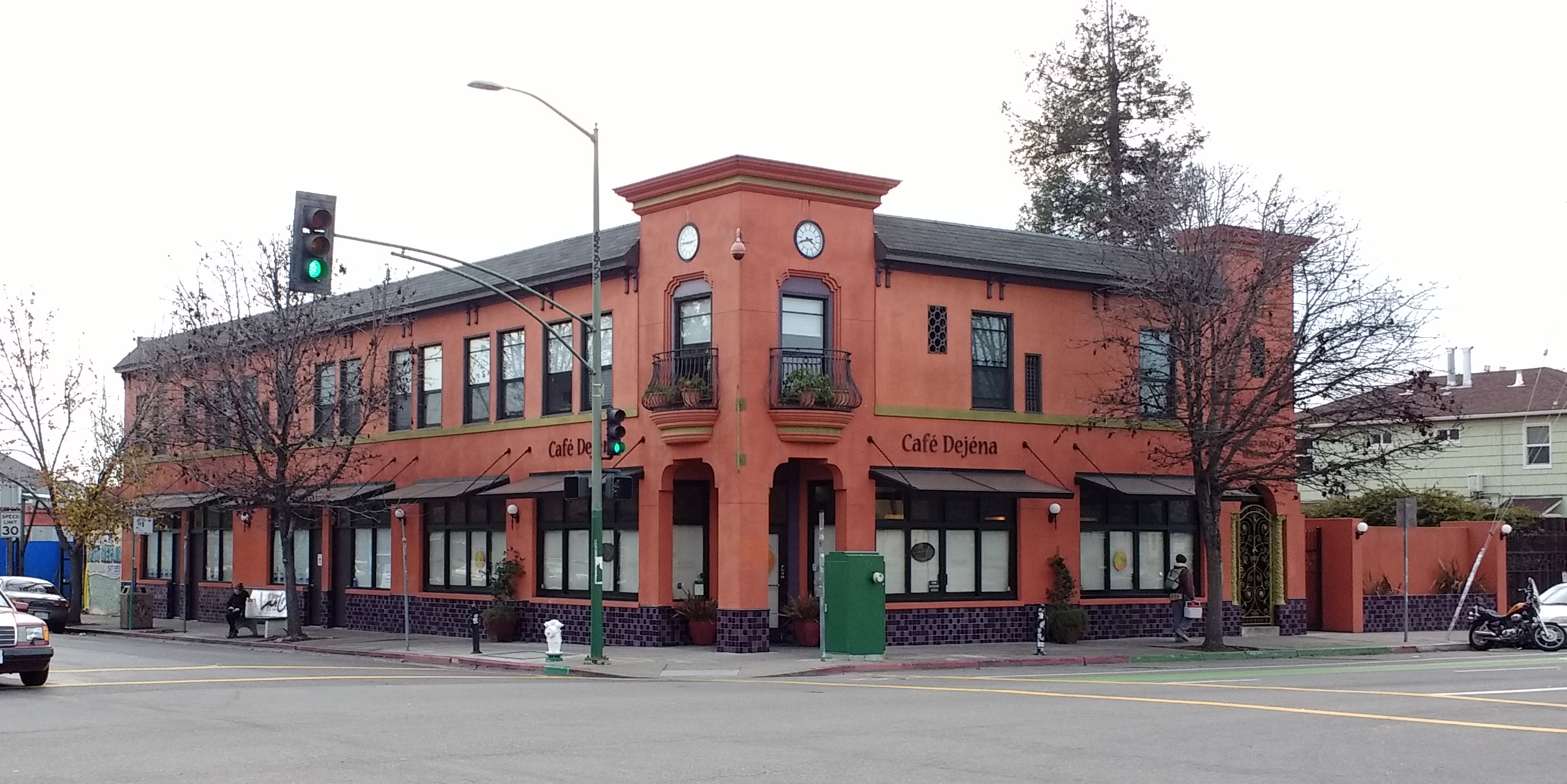 Café Dejéna, a restaurant in Oakland, California.